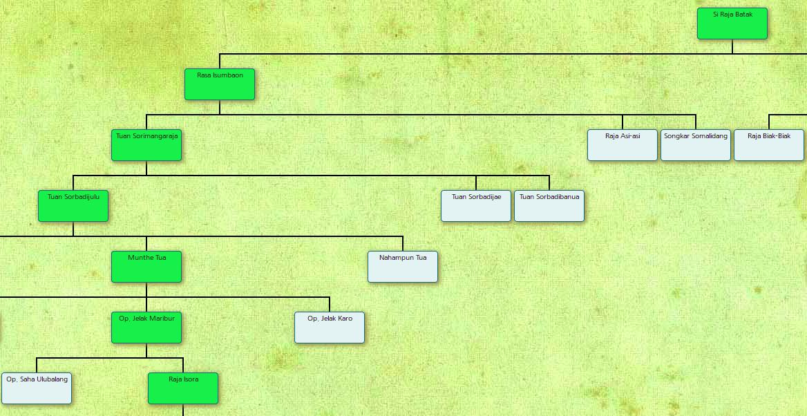 Silsilah marga Haromunthe dari Si Raja Batak hingga Raja Isora, putra Jelak Maribur yang menurunkan marga Haromunthe